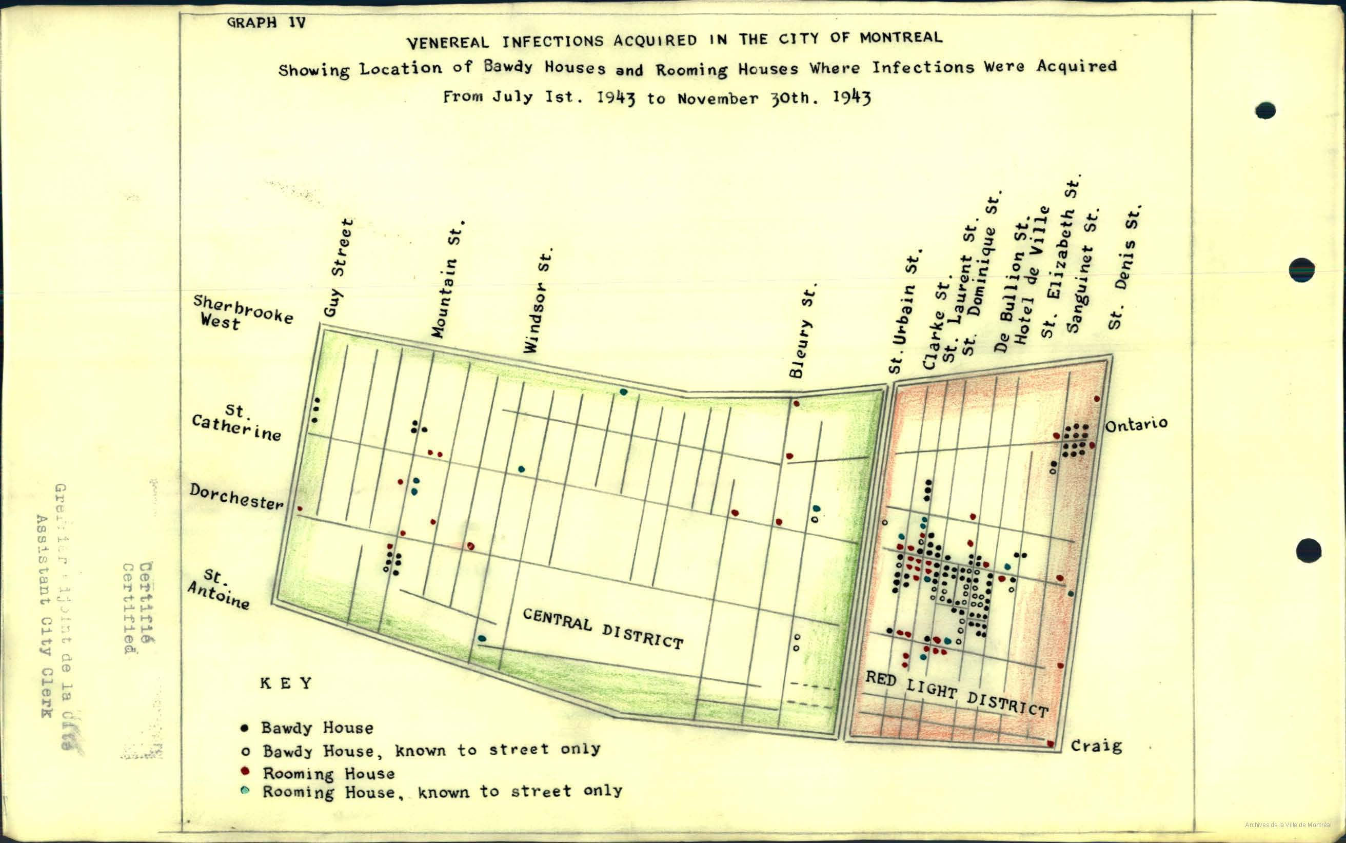 Carte des bordels montréalais où les soldats ont contracté des maladies vénériennes : rapport de l’Armée sur la situation croissante des maladies vénériennes à Montréal. 1944.